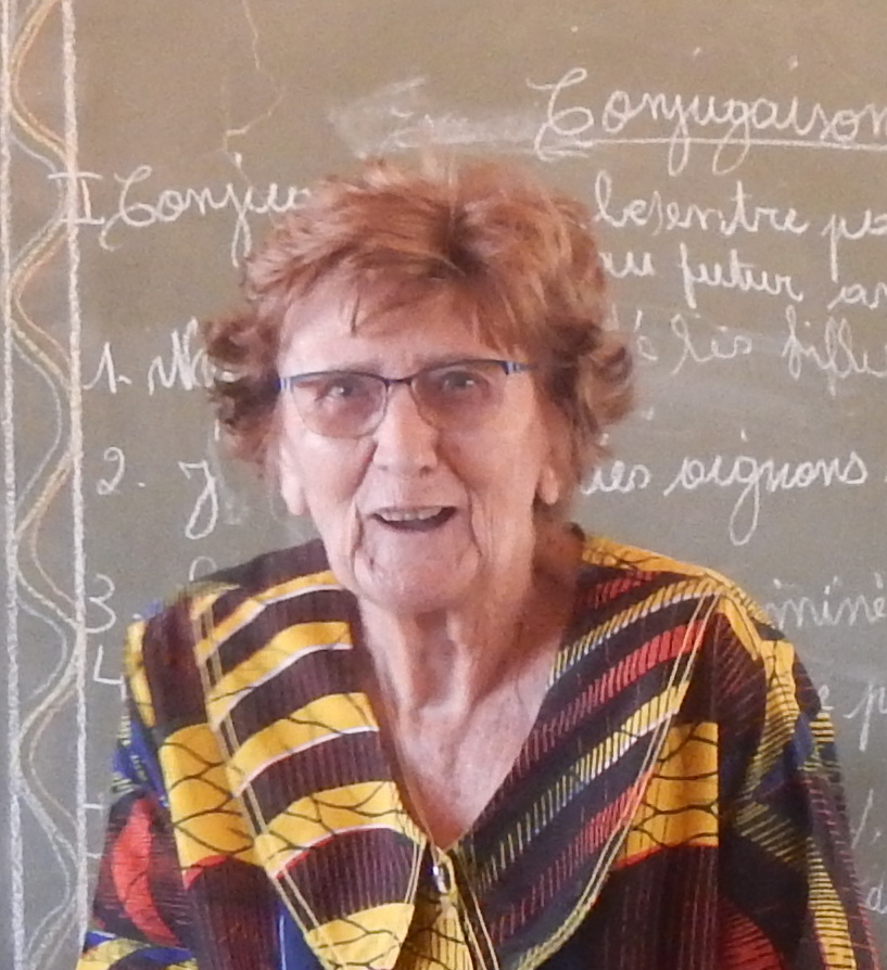 Van Espen Florentine; Januari 2019